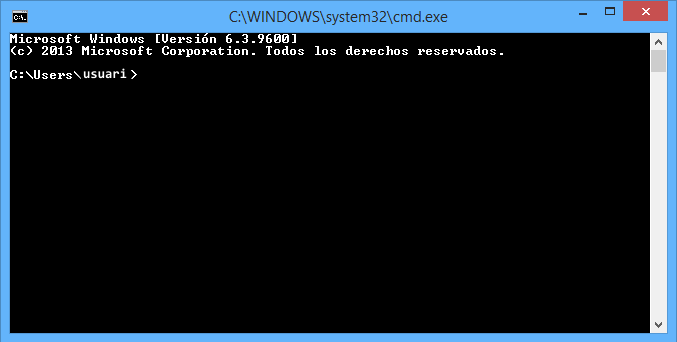 Com es veu la pantalla del CMD